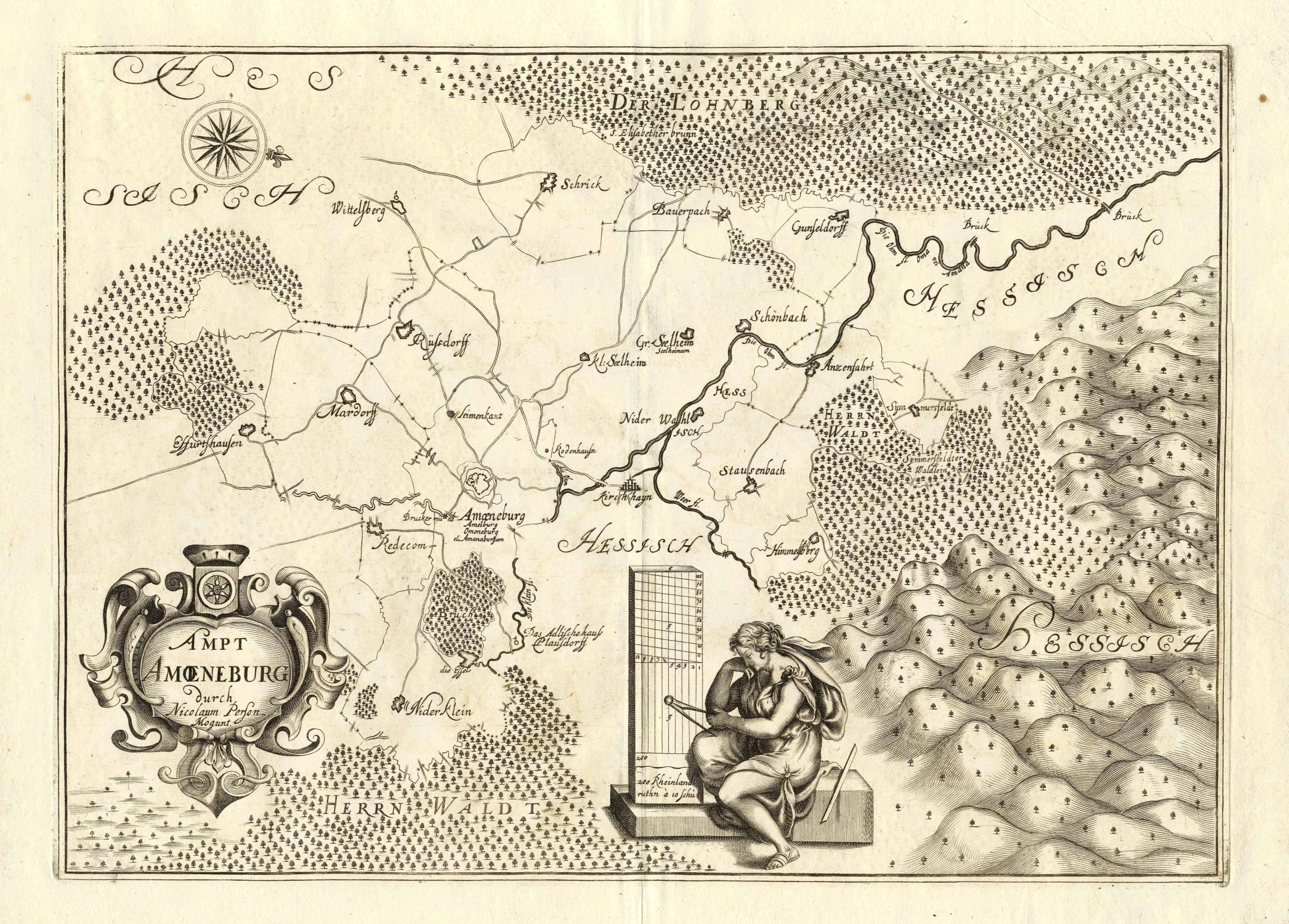 Ampt Amoeneburg: Eine Karte (Kupferstich) aus dem Atlas Novae Archiepiscopatus Moguntini Tabulae von Nikolaus Person aus dem Jahre 1694. Das Blatt ist nahezu nach Westen ausgerichtet und zeigt den Ort Amöneburg in Hessen mit den umliegenden Gebieten.